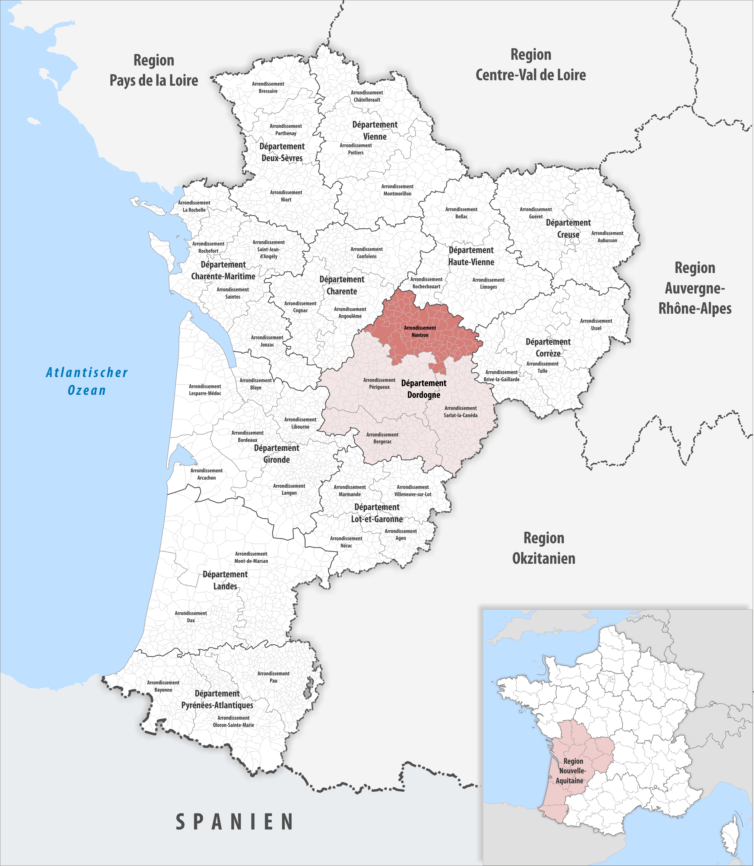 Lage des Arrondissements Nontron